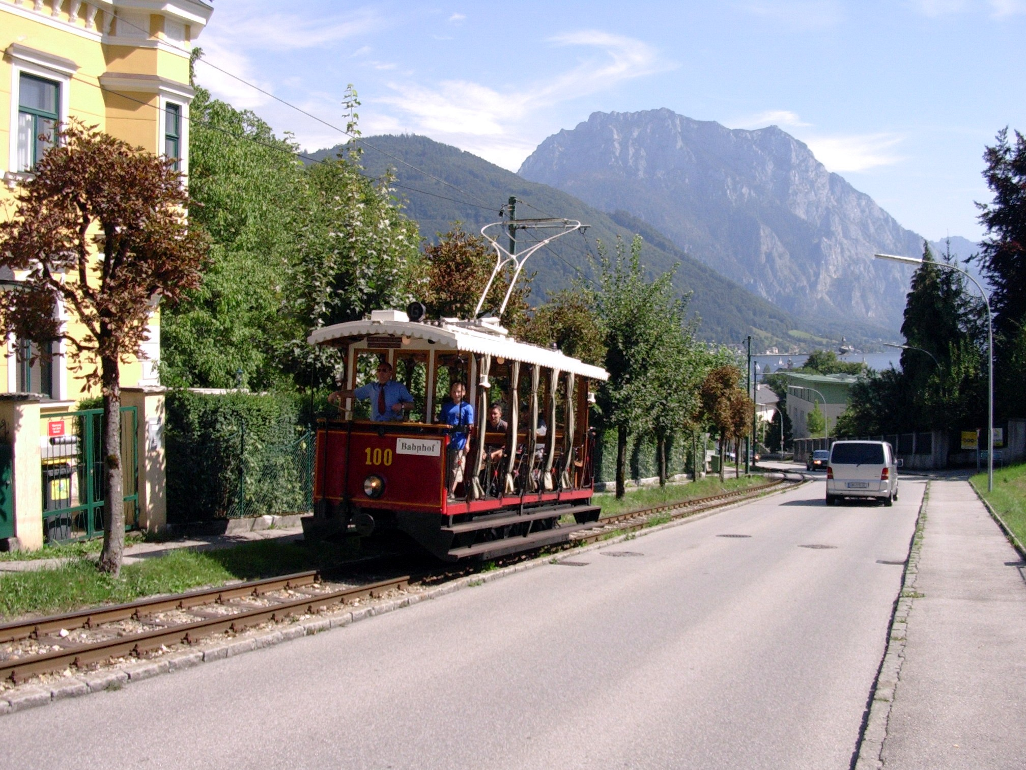 GM 100 in der Steigung, im Hintergrund Grünberg und Traunstein